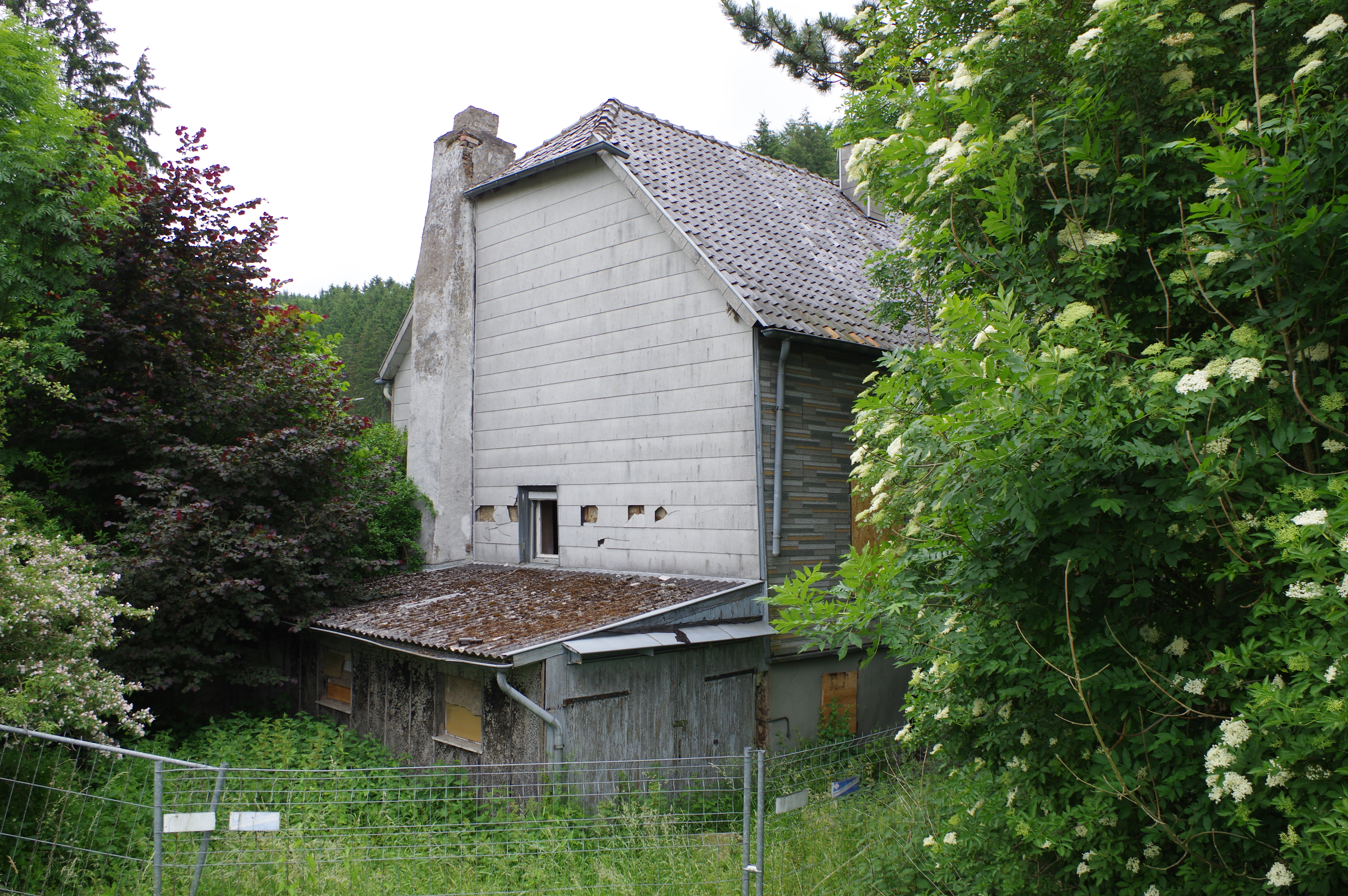 Hellenthal, Hardtstr. 2, Westseite